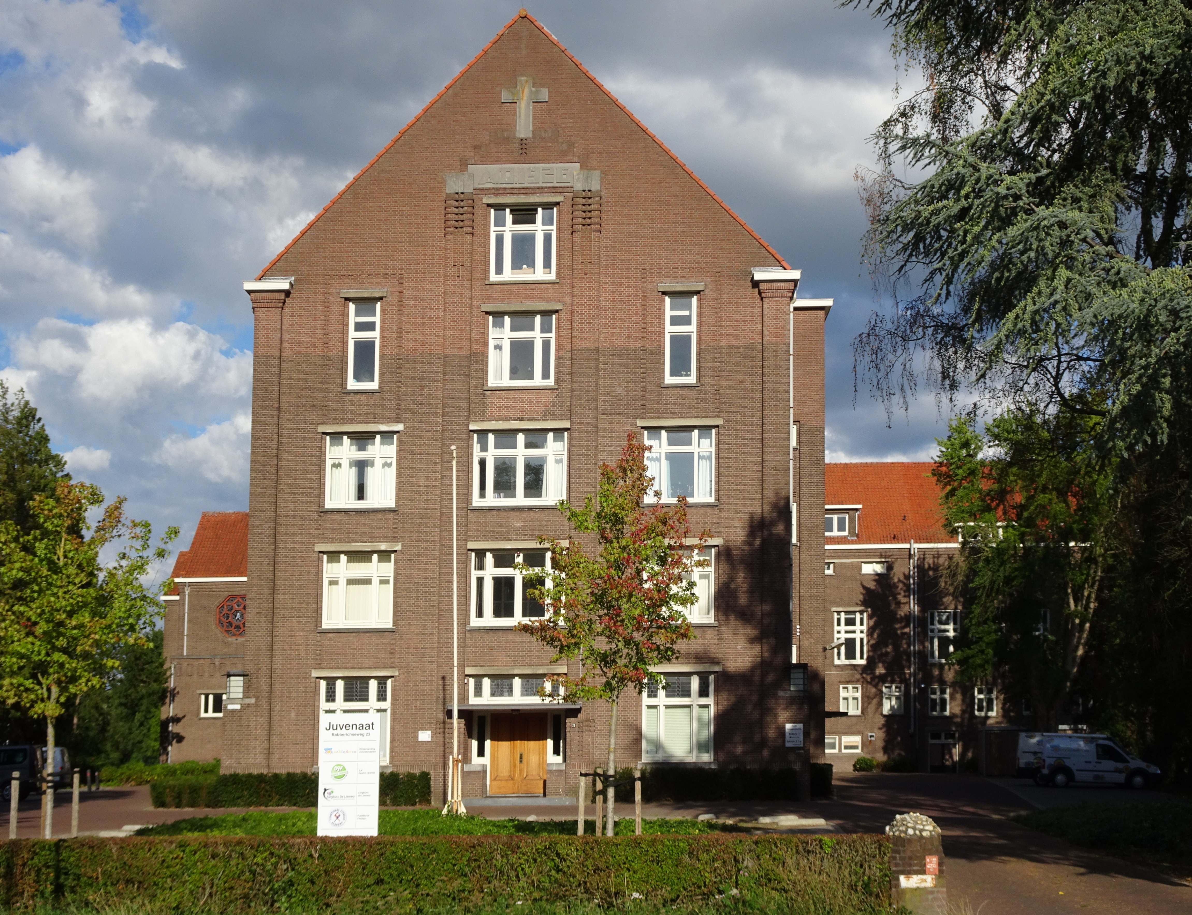 Zevenaar, Babberichseweg, voormalig Juvenaat